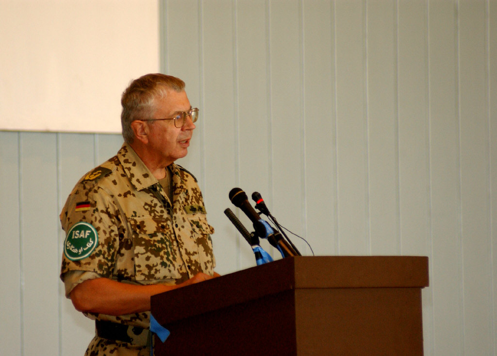 Bundeswehr General Norbert Van Heyst in 2003.